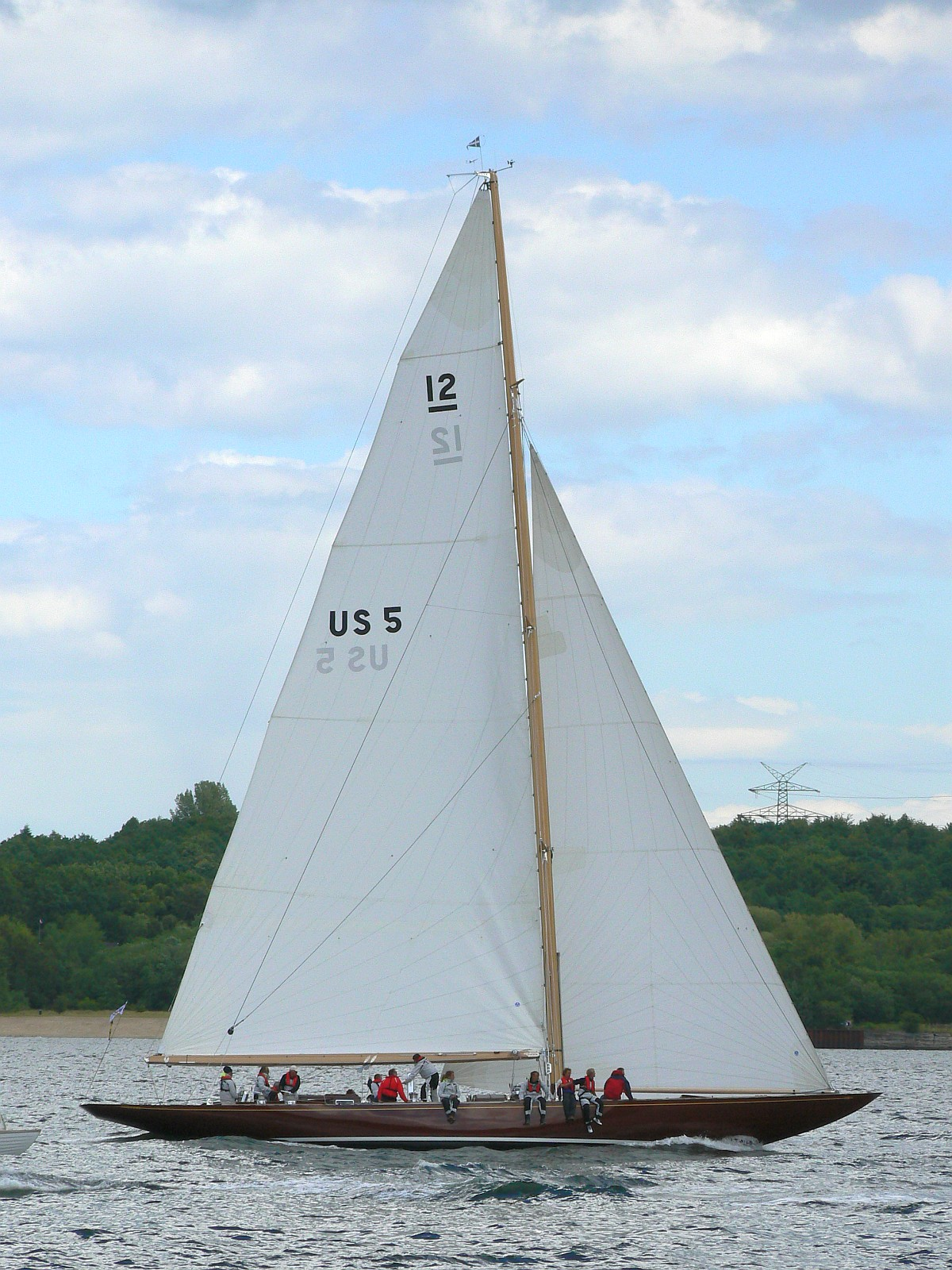 12mR Yacht Anitra (Bj. 1928) bei der Regatta "Rendezvous der Klassiker" in der Kieler Förde mit historischen Yachten bei der Kieler Woche 2009.